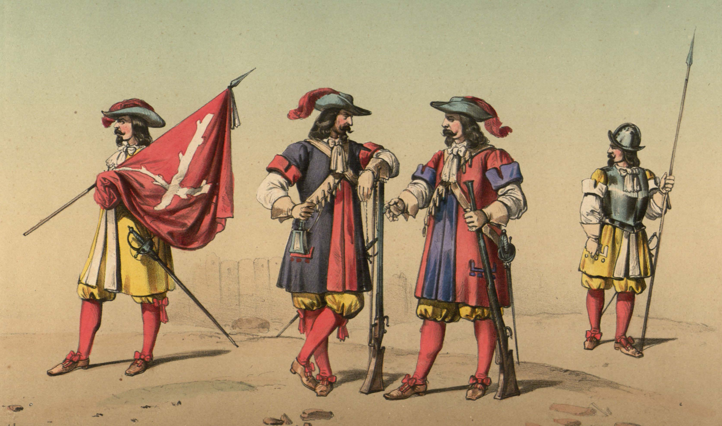 Infantería de linea española de la dinastía austriaca en el siglo XVII: alférez del tercio de los amarillos viejos, mosquetero del tercio de los morados viejos, arcabucero del tercio de los colorados viejos y piquero del tercio de los amarillos nuevos.